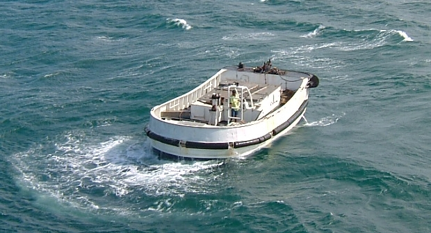 Tuna Purser skiff boat. Skiff de thonier senneur congélateur.